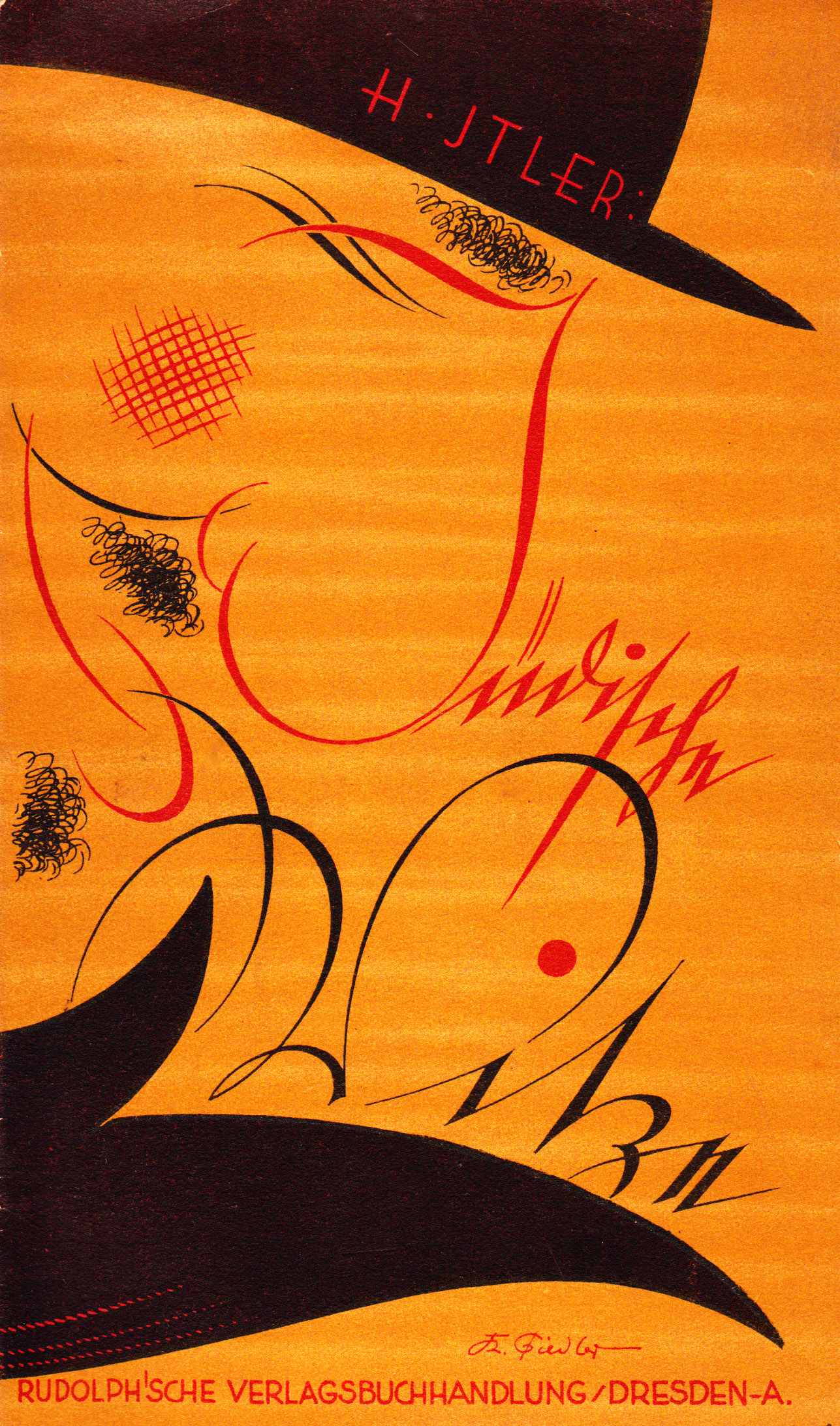 Book cover Jüdische Witze, Rudolph'sche Verlagsbuchhandlung Dresden, 1st edition (1-15000), 1927